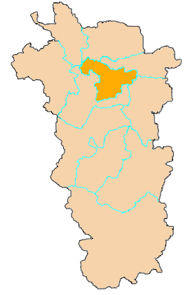 Mapa powiatu jasielskiego